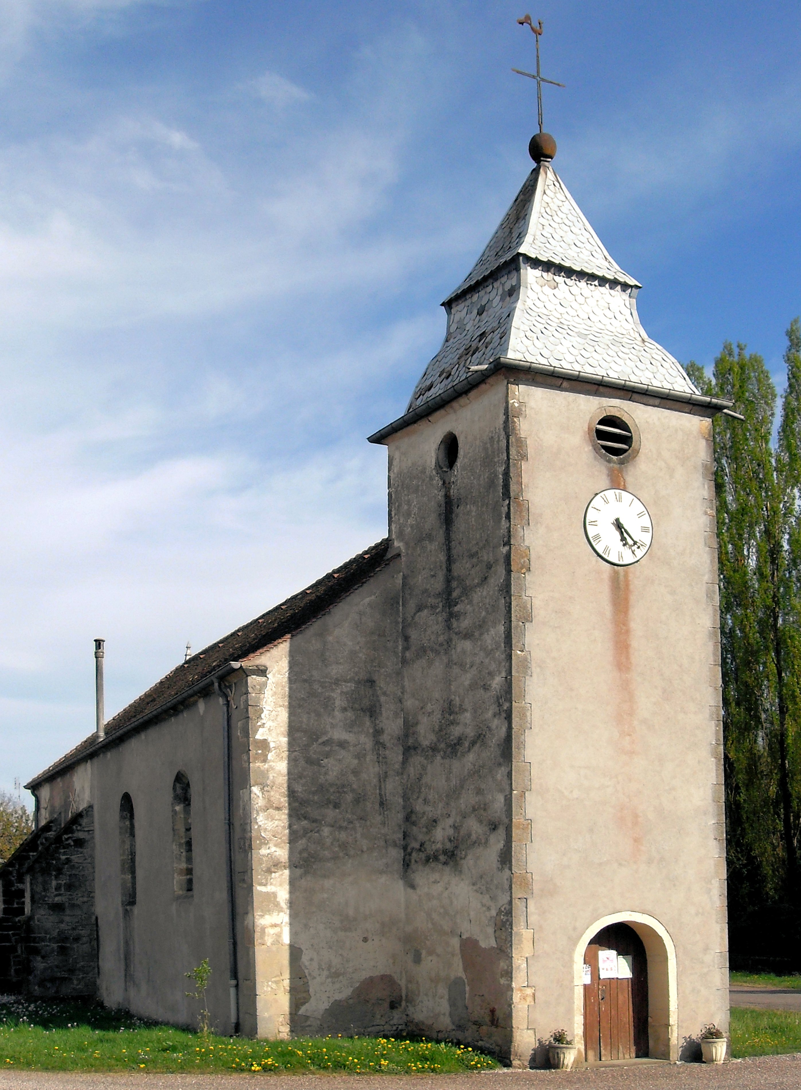 L'église de la Nativité-de-Notre-Dame de Montcourt